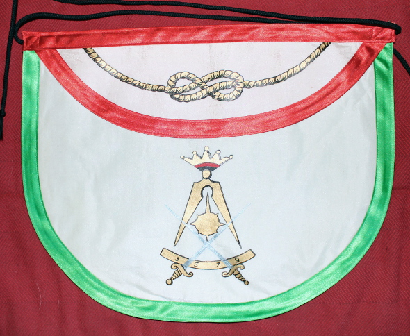 Tablier peint sur soie de Template:IIIe Ordre du Rite français moderne